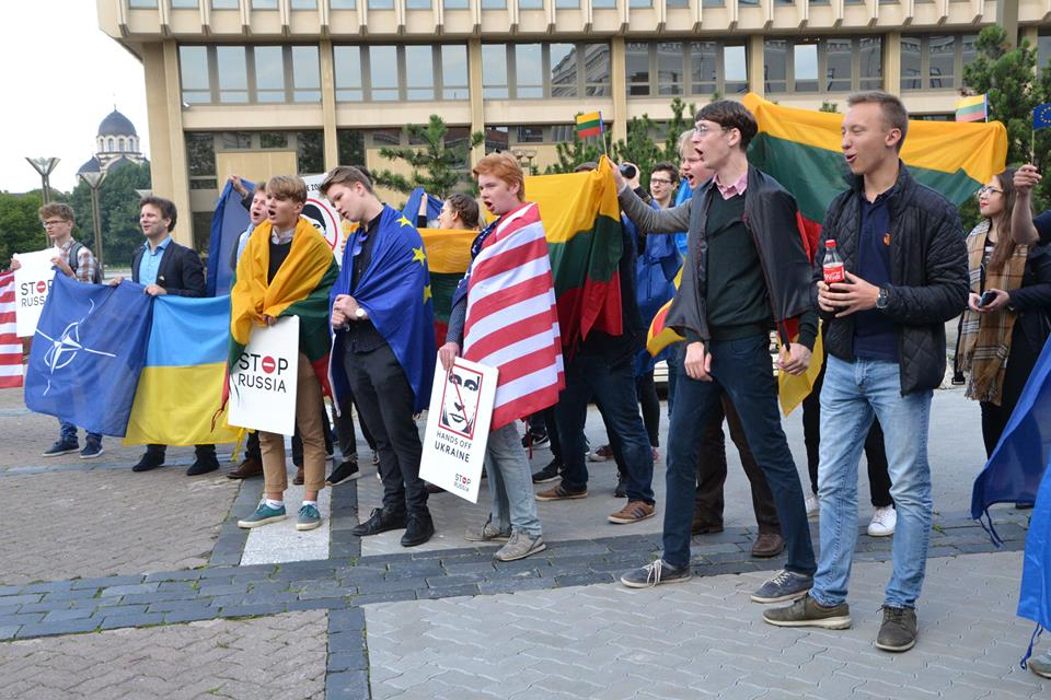 Akimirka iš 2017 m. rugsėjį vykusio kontrmitingo, organizuoto šalia Vytauto Šustausko prie Seimo surengto mitingo.